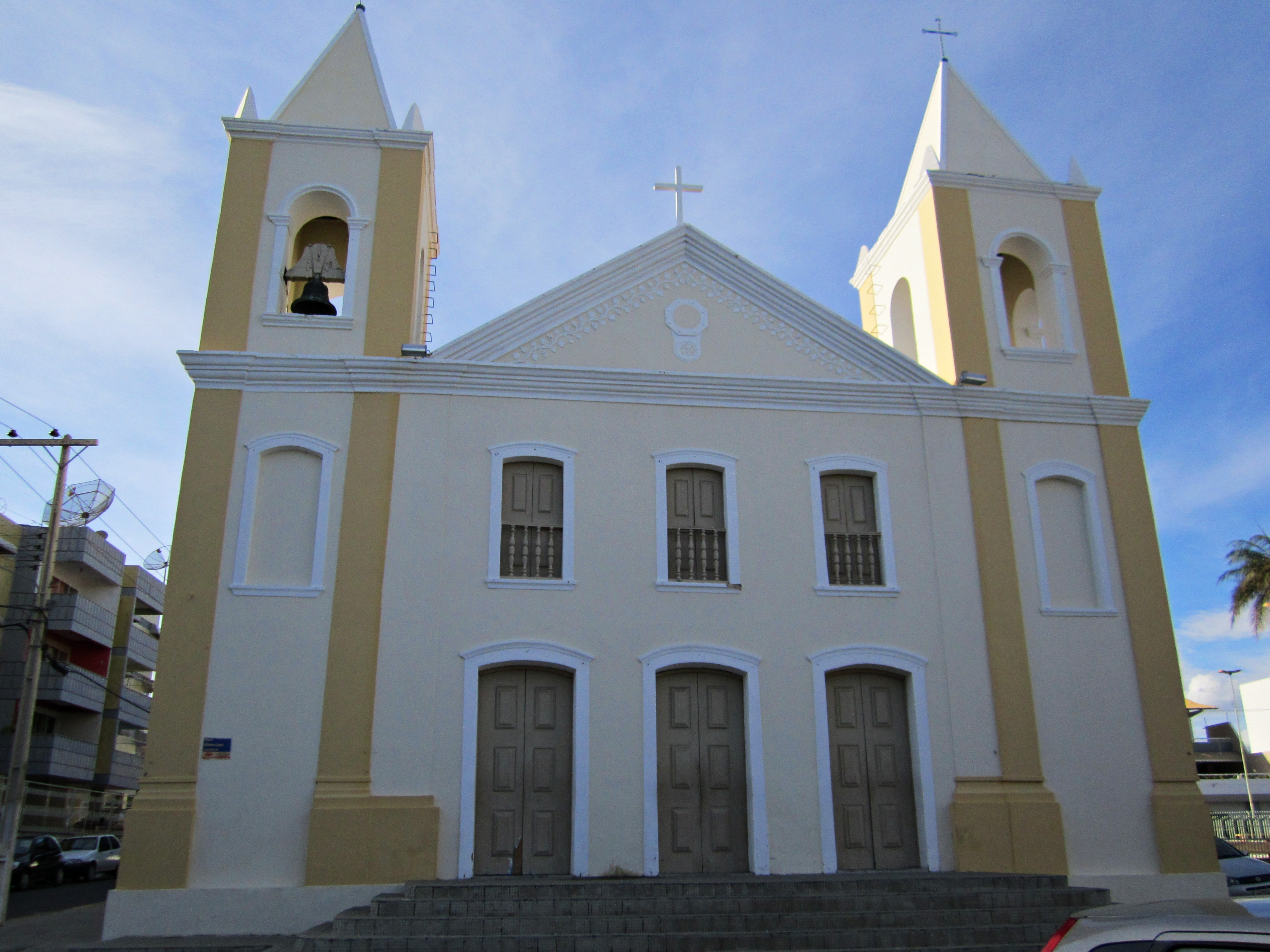 Matriz – Igreja Nossa Senhora Rainha dos Anjos - Petrolina, Pernambuco, Brasil